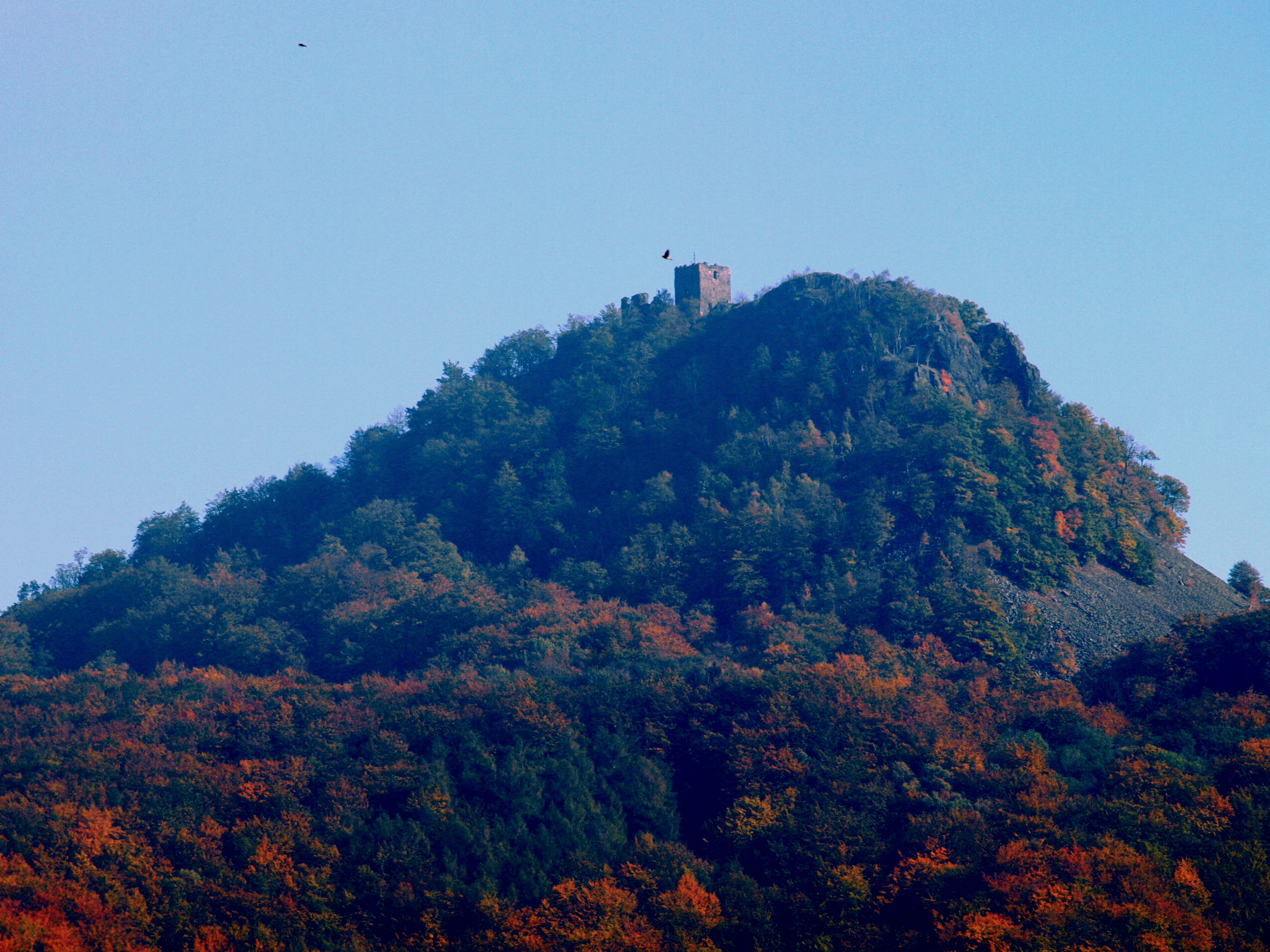 Kopec Ralsko